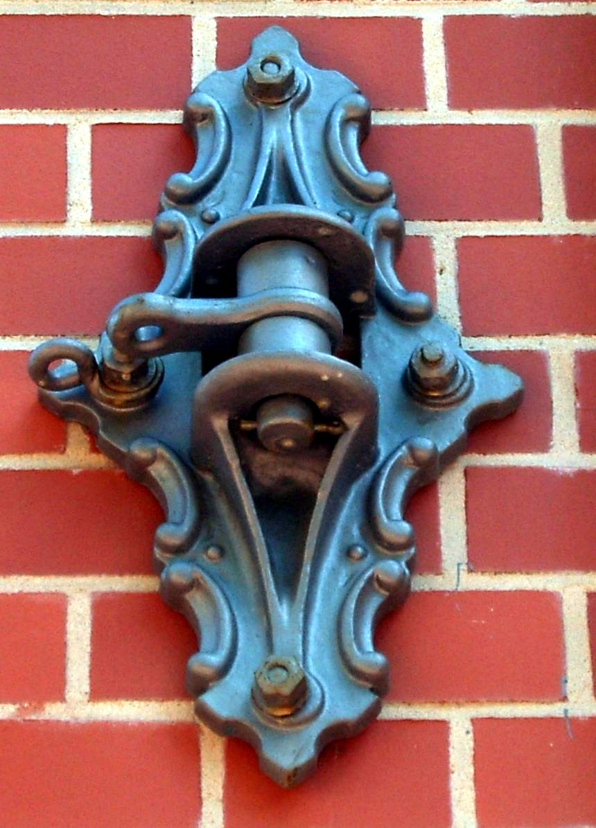 Wandsrosette der Hamburger Straßenbahn in Harburg. Die restaurierte Rosette befindet sich am Deichhausweg/Harburger Rathausplatz an der alten Post, deren Außenfassade nach Abriss in ähnlicher Form wieder aufgebaut wurde. Darunter befindet sich eine Plakette mit folgender Aufschrift: "Diese Wandrosette befand sich an dem Postgebäude, das bis 2001 an dieser Stelle stand. Sie war ursprünglich etwas höher angebracht und diente zur Befestigung der Oberleitung für die Straßenbahn Linie 42 nach Heimfeld, die hier 1907 ihren elektrischen Betrieb aufnahm und am 1.Oktober 1957 eingestellt wurde"